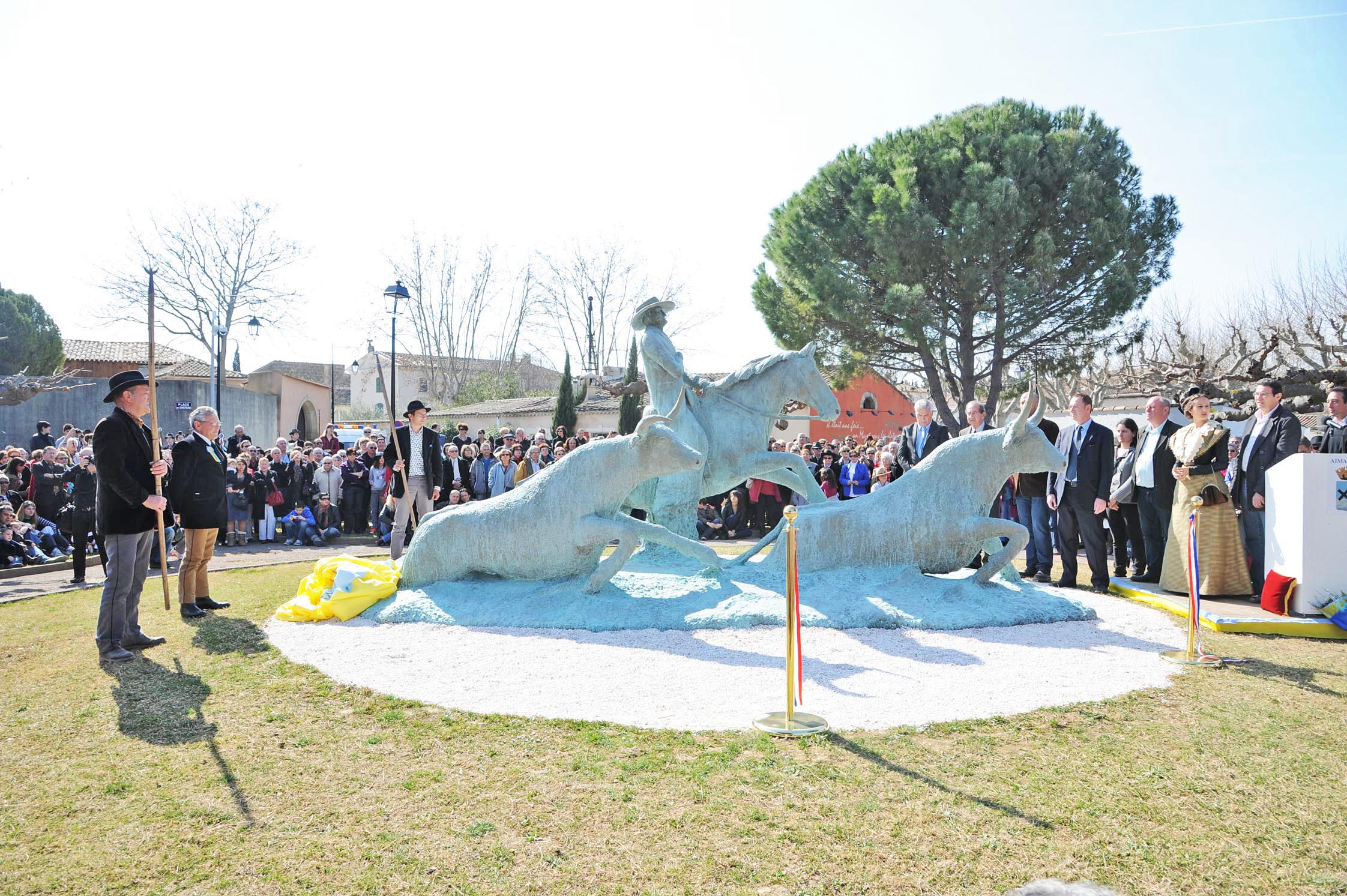 Place du château à Aimargues le 4 mars 2012